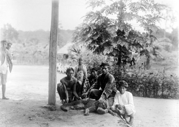 Repronegatief. Mannen en een kind met een pas geschoten panter te Bantam, West-Java